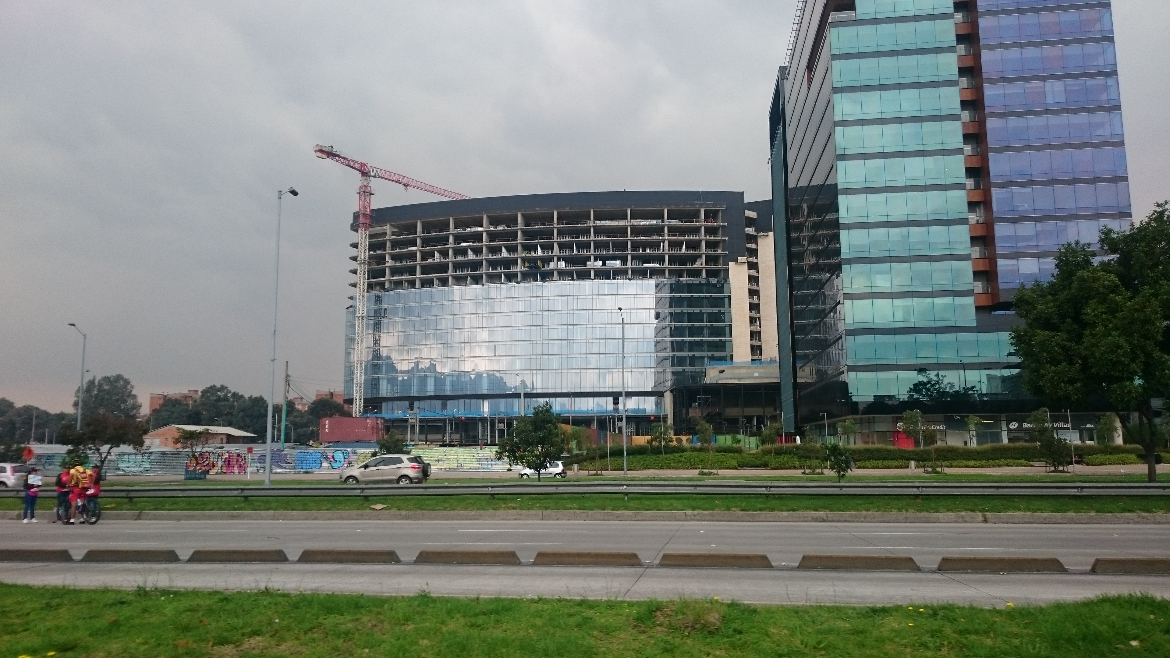 Hyatt 200317